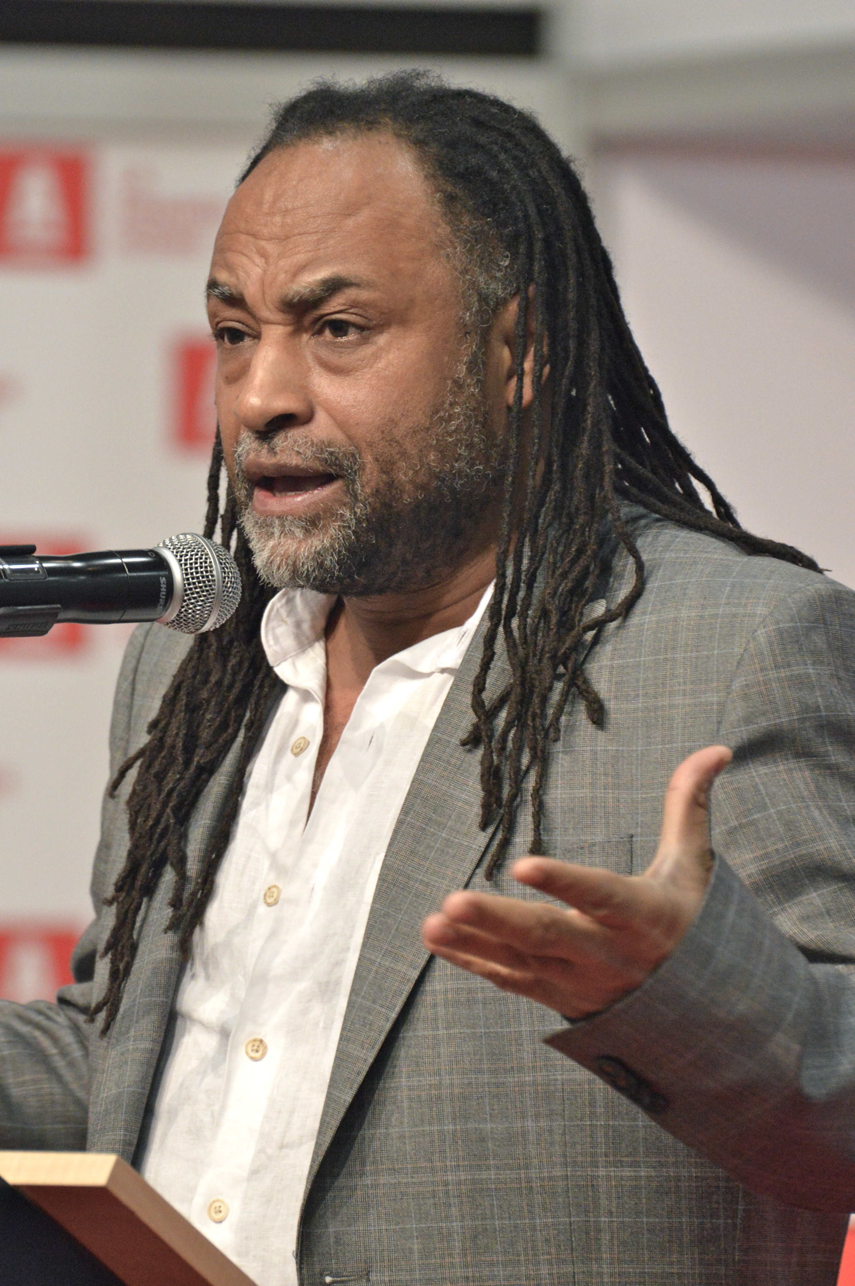 Rodney Saint-Éloi au Salon international du livre de Québec 2014